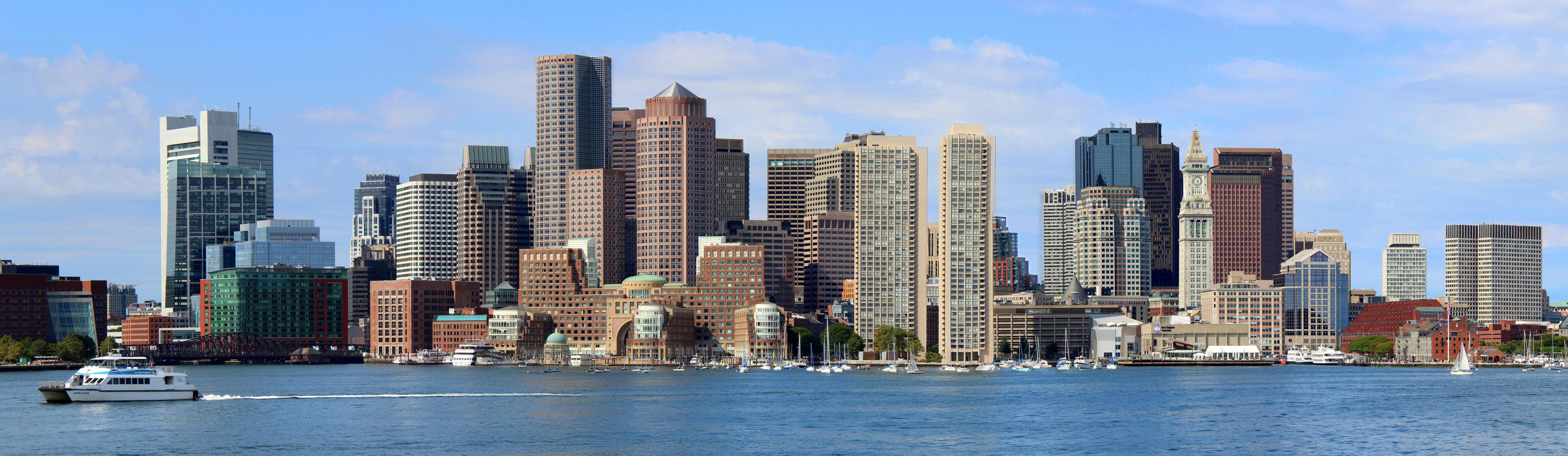 Boston